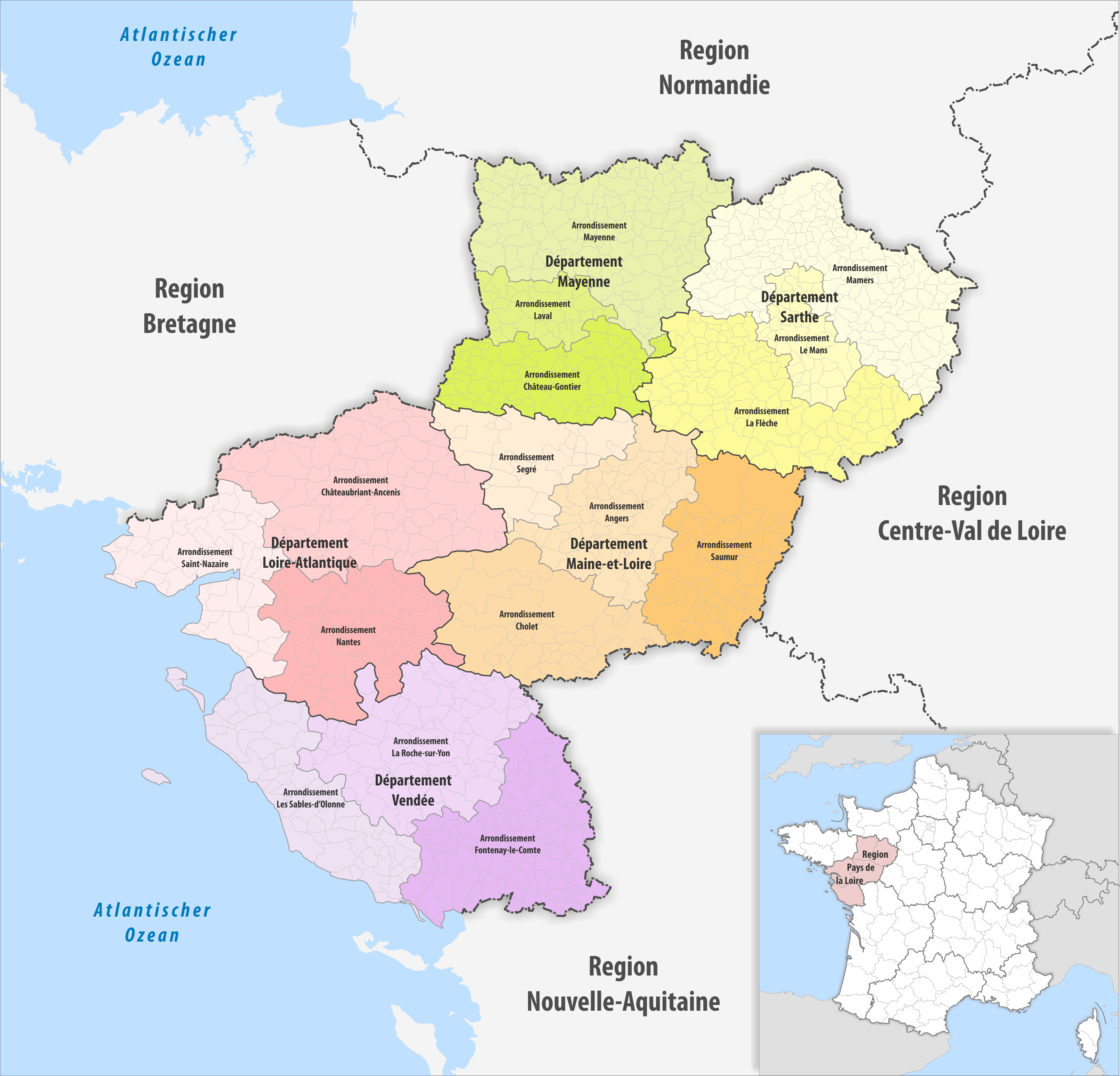 Gemeinden, Arrondissemente und Departemente in der Region Pays de la Loire